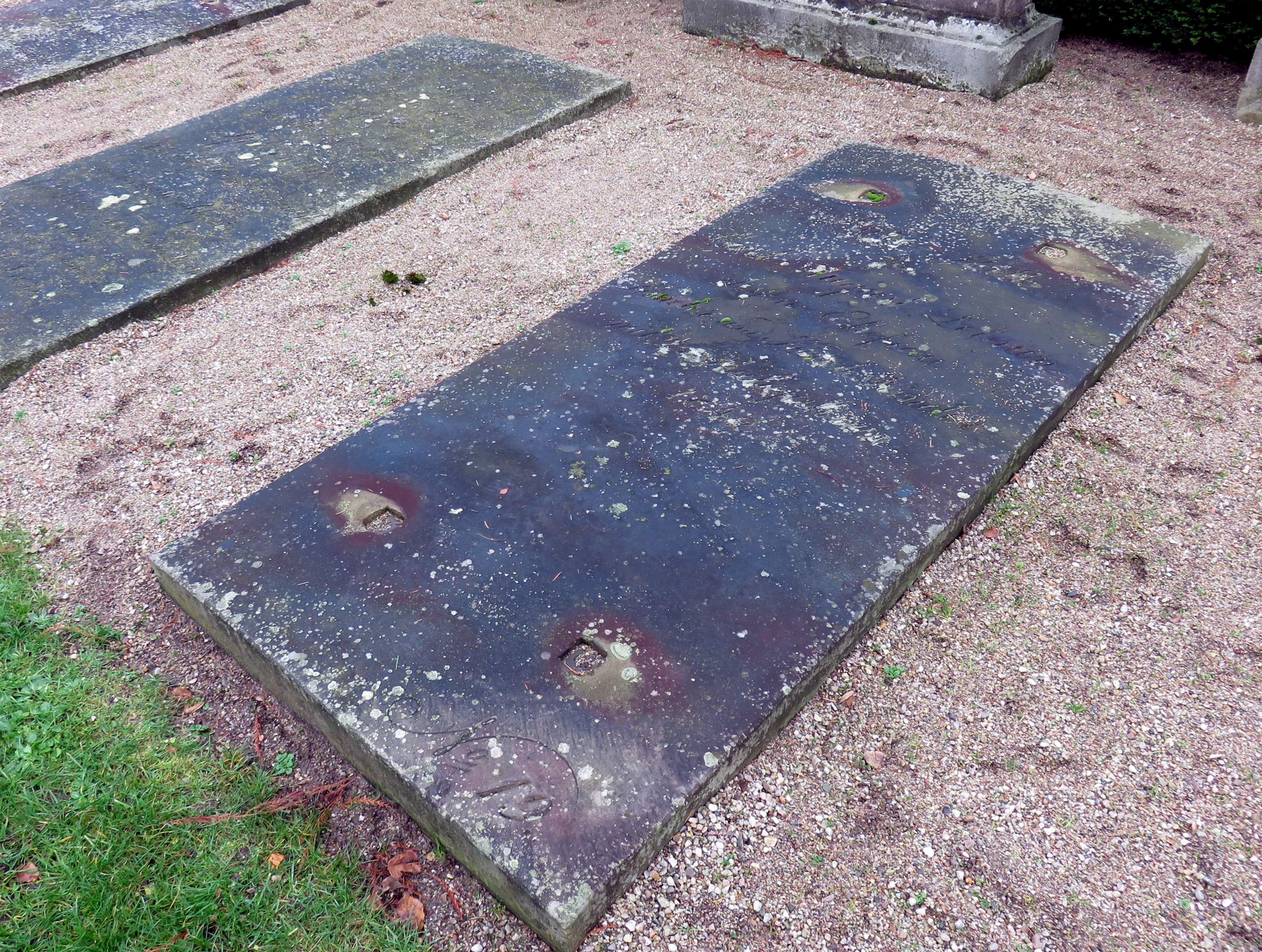 Grabmal für den deutschen Schauspieler und Dramatiker Carl August Lebrun (1792–1842) im Grabmal-Freilichtmuseum Heckengarten auf dem Hamburger Friedhof Ohlsdorf, Inschrift bei .